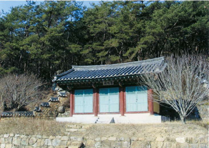 경상남도 문화재자료 제25호 창녕 문암정, 신초 유허비, 신초 초상 (昌寧 聞巖亭, 辛礎 遺虛碑, 辛礎 肖像)